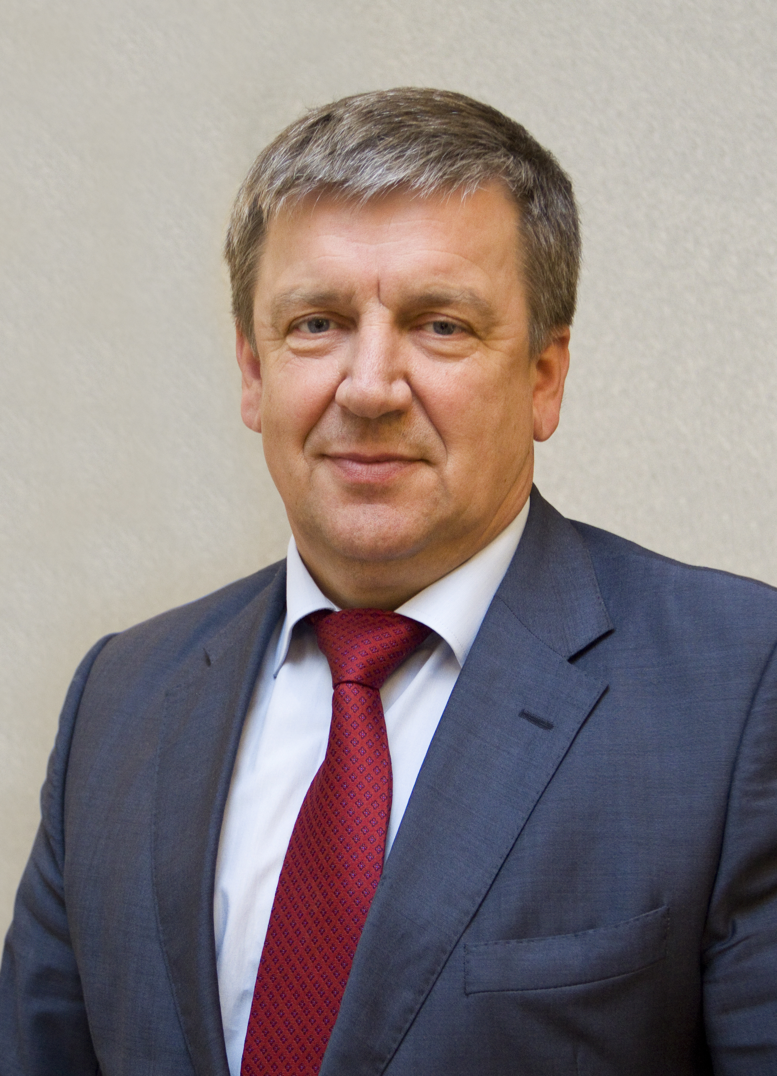 Глава Республики Карелия Александр Петрович Худилайнен